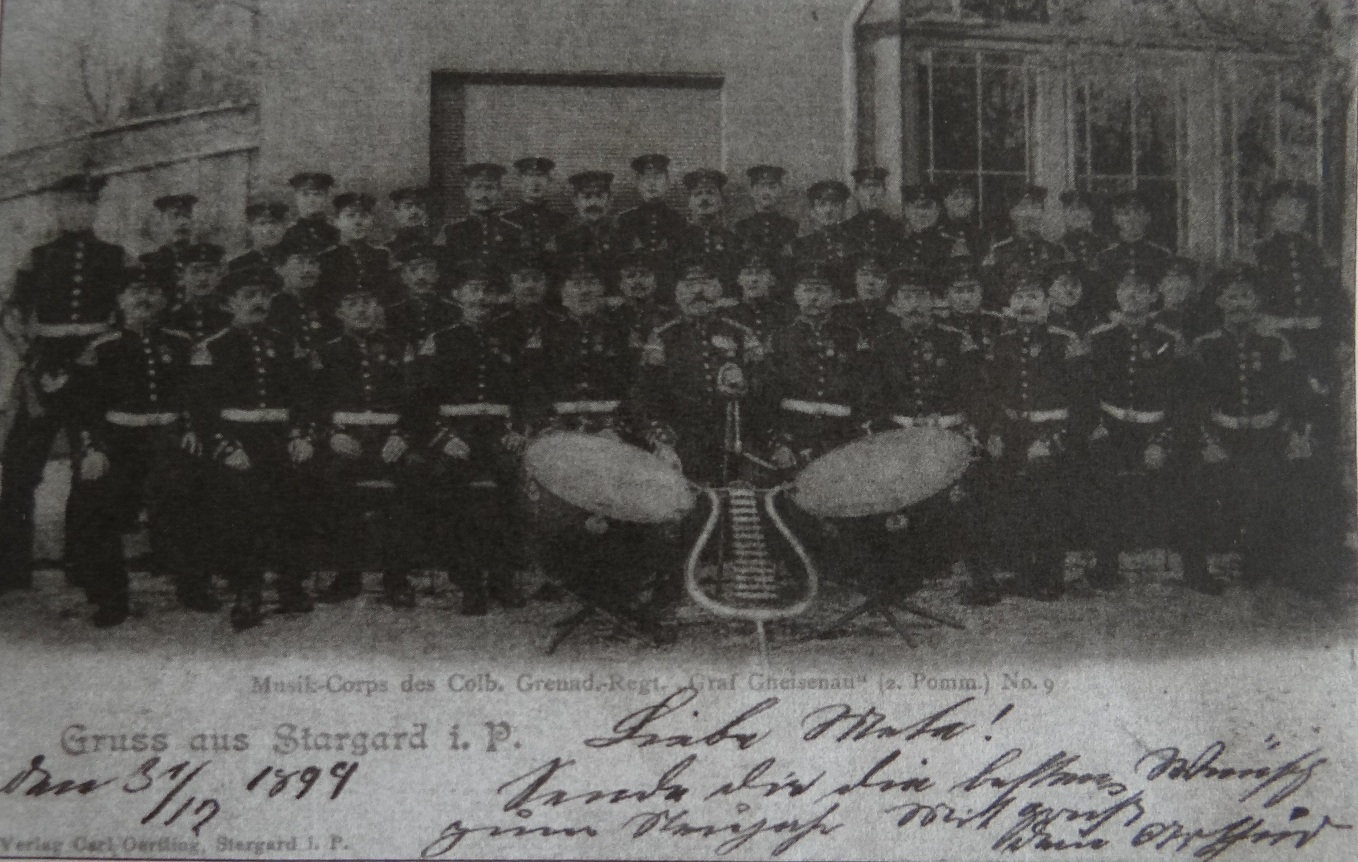 Stargard i. P. Orkiestra 9 Kołobrzeskiego Pułku Grenadierów, koniec XIX w.